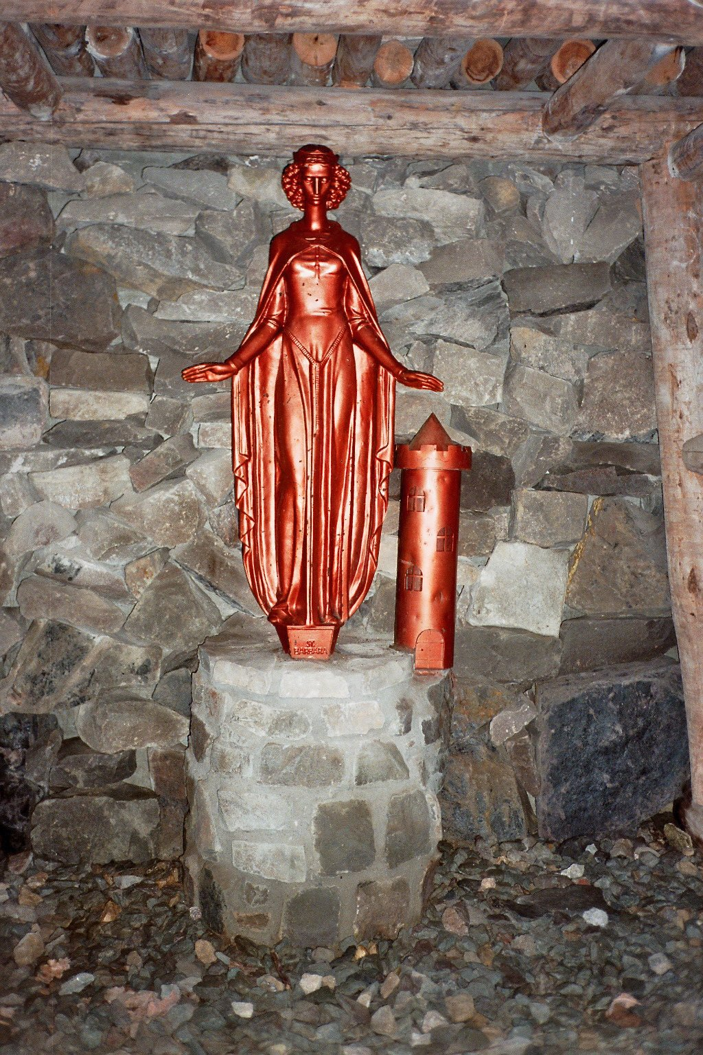 St. Barbara als Schutzheilige der Bergleute im Ruhrgebiet